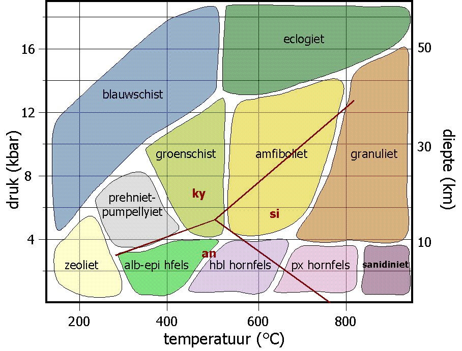 Diagram dat het verband weergeeft tussen druk en temperatuur en de verschillende metamorfe facies die daarbij ontstaan. Typerend voor de verschillende facies van lage tot gemiddelde druk en temperatuur, is het voorkomen van de polymorfe nesosilicaten andalusiet (lage druk), kyaniet (hogere druk en lagere temperatuur) en sillimaniet (hogere temperatuur). Deze varianten van Al2SiO5 zijn stabiel bij bepaalde temperaturen en drukken en geven zo een indicatie van de facies en graad van metamorfose. In de figuur zijn ze aangegeven met "an", "ky" en "si".